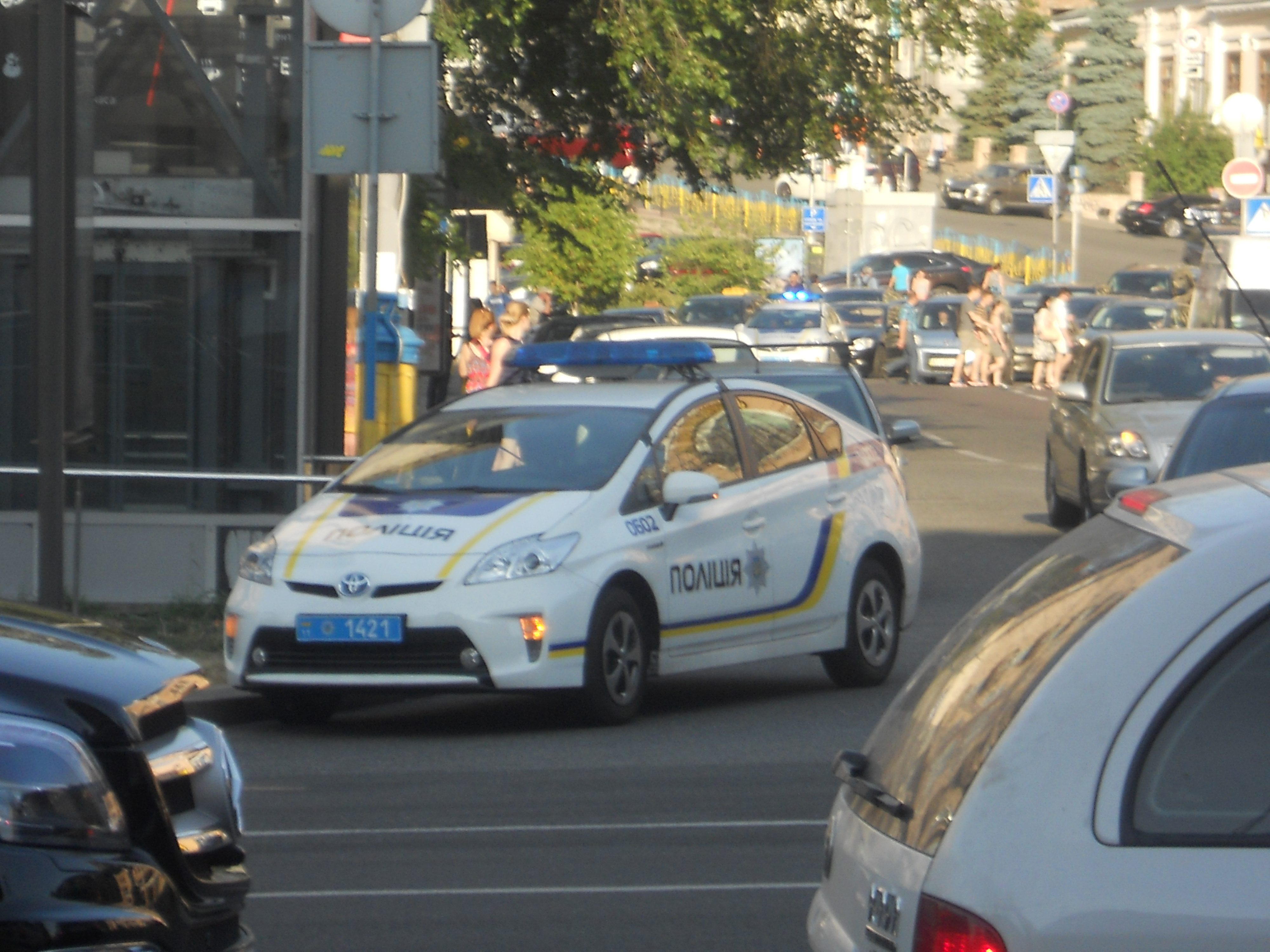 Toyota Prius (XW30) у Києві, Національна поліція України, 7 липня 2015